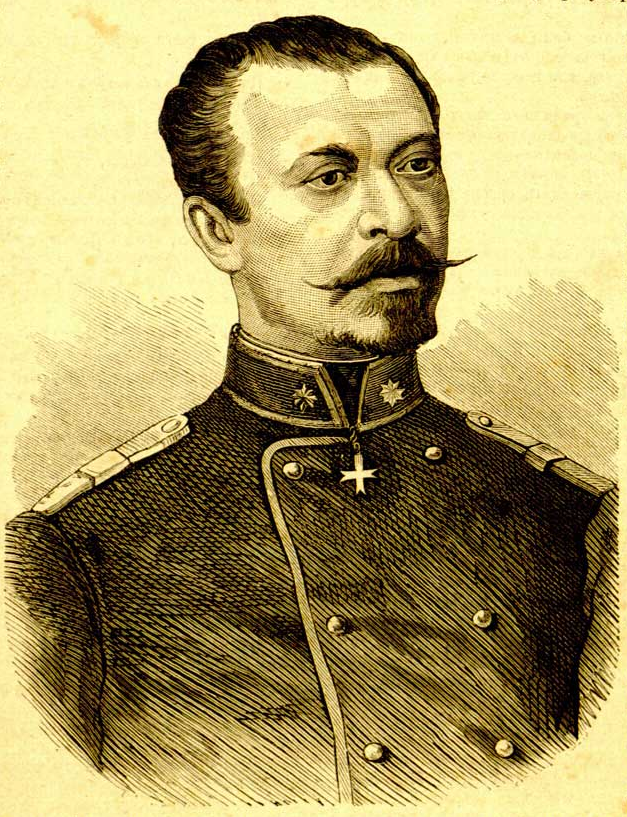 Der russischer und serbischer General Michail Grigorjewitsch Tschernjajew